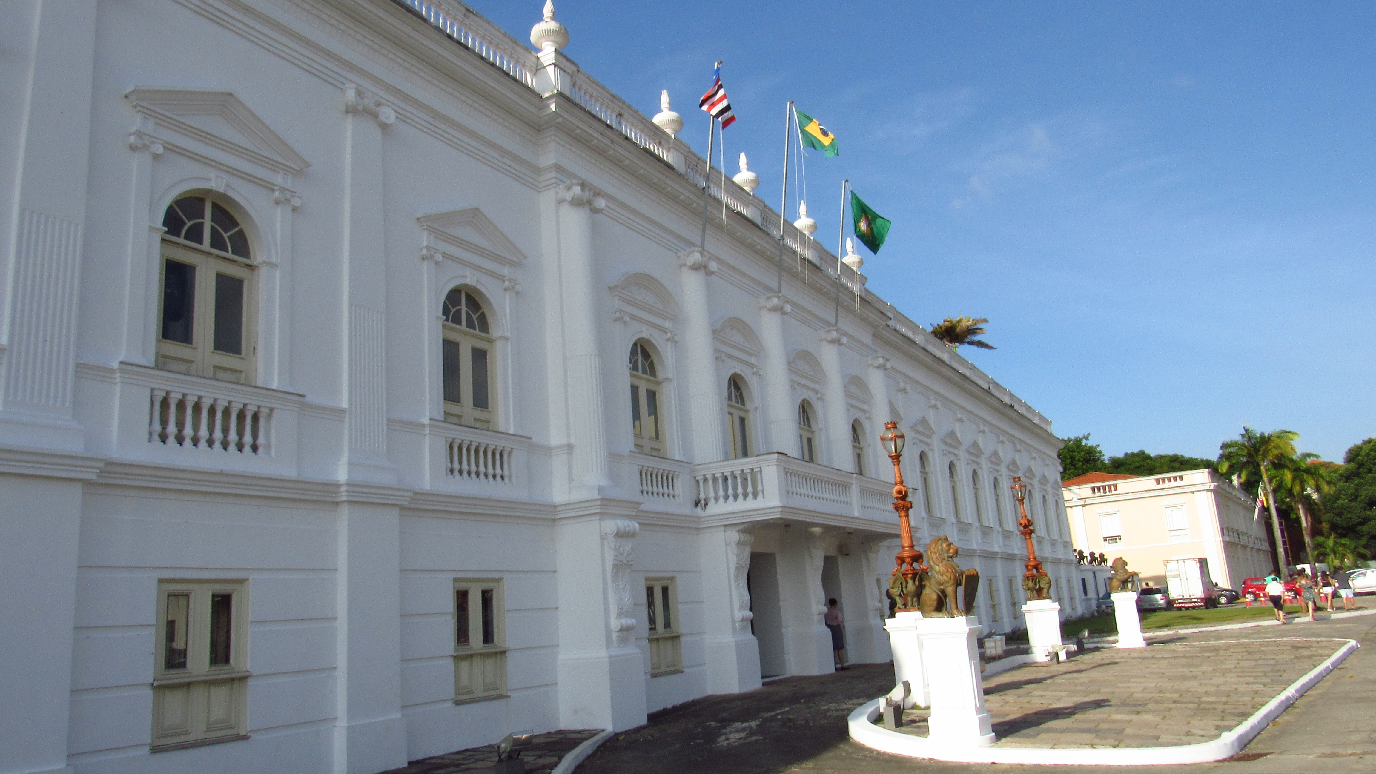 [Palácio dos Leões é o edifício-sede do governo do estado brasileiro do Maranhão. Localiza-se no centro histórico da cidade de São Luís, na área designada Patrimônio Mundial pela UNESCO. Com uma história que começa no início do século XVII, o Palácio dos Leões um dos maiores símbolos da cultura maranhense.] Fonte: Wikipedia.